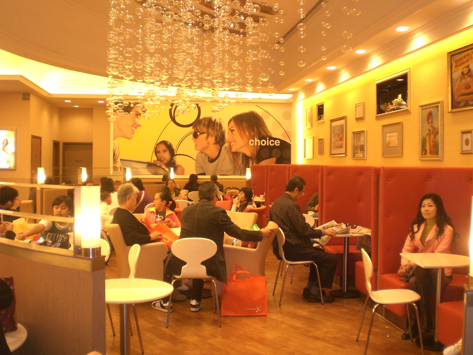 澳門威尼斯人渡假村酒店麥當勞